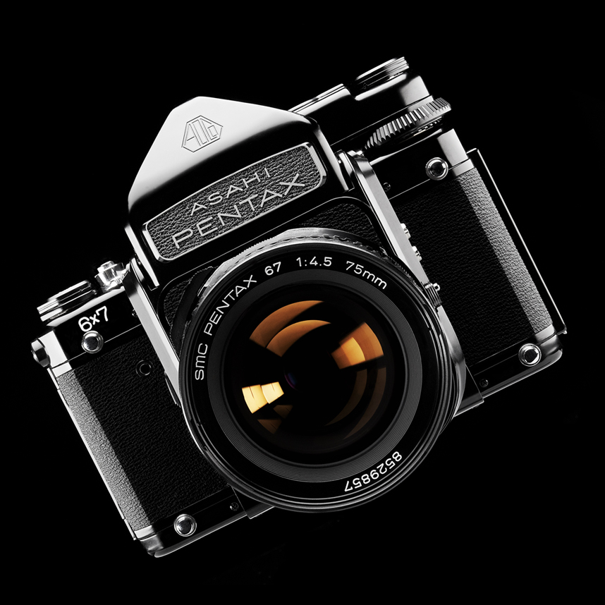 Pentax 6x7 Camera